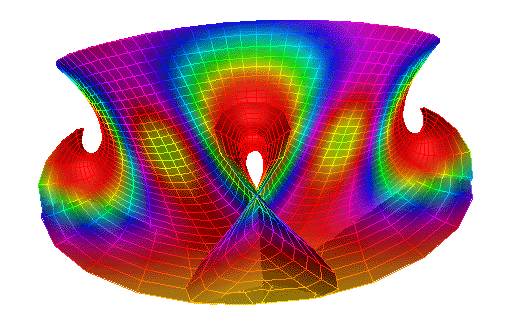 Поверхность из галереи Альфреда Грэя